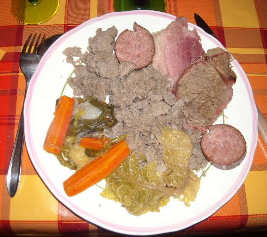 Plat traditionnel de Basse-Bretagne : Kig-Ha-Farz